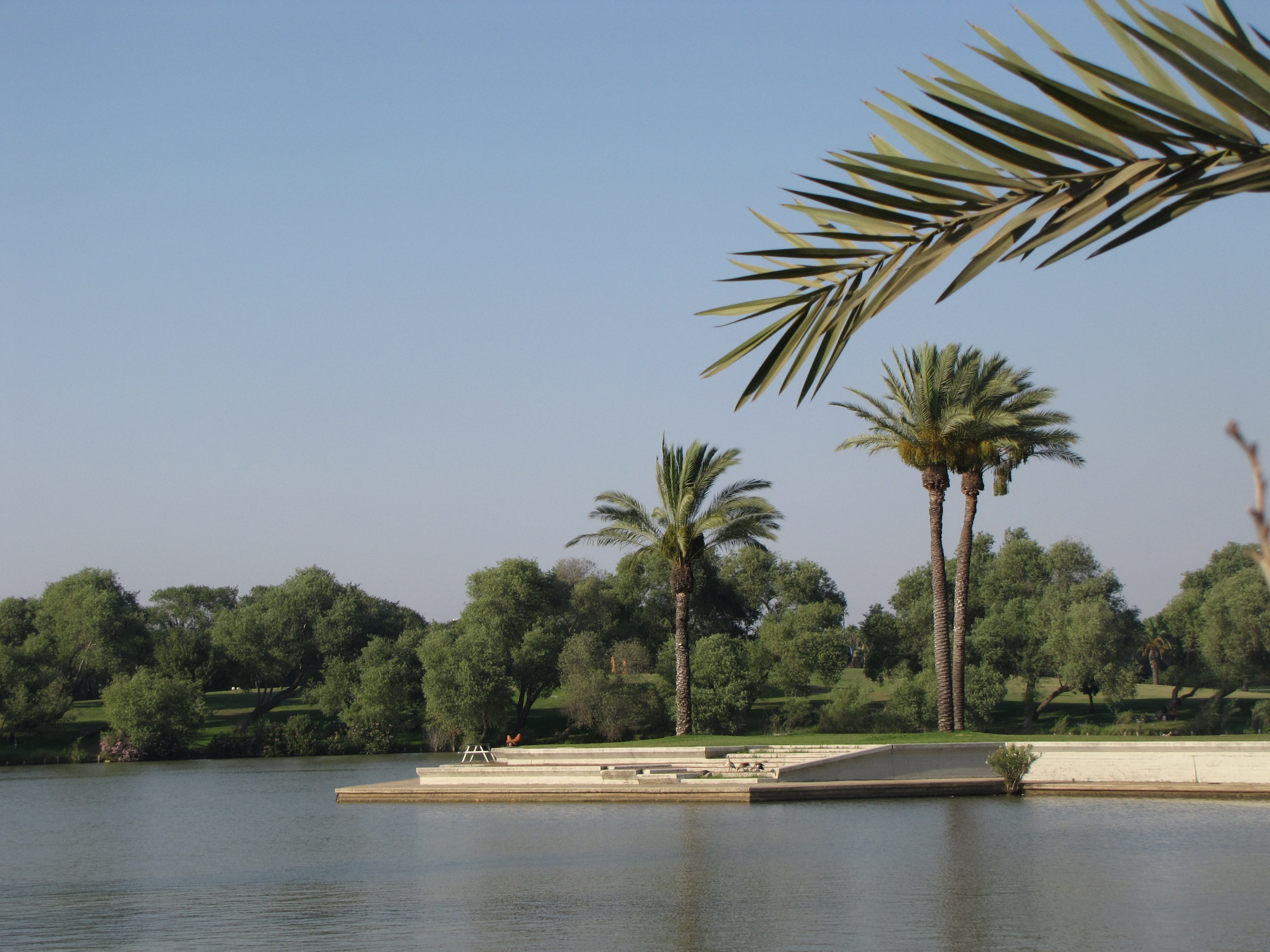 Central park Hayarkon in Tel Aviv. Picture taken in July 2009.